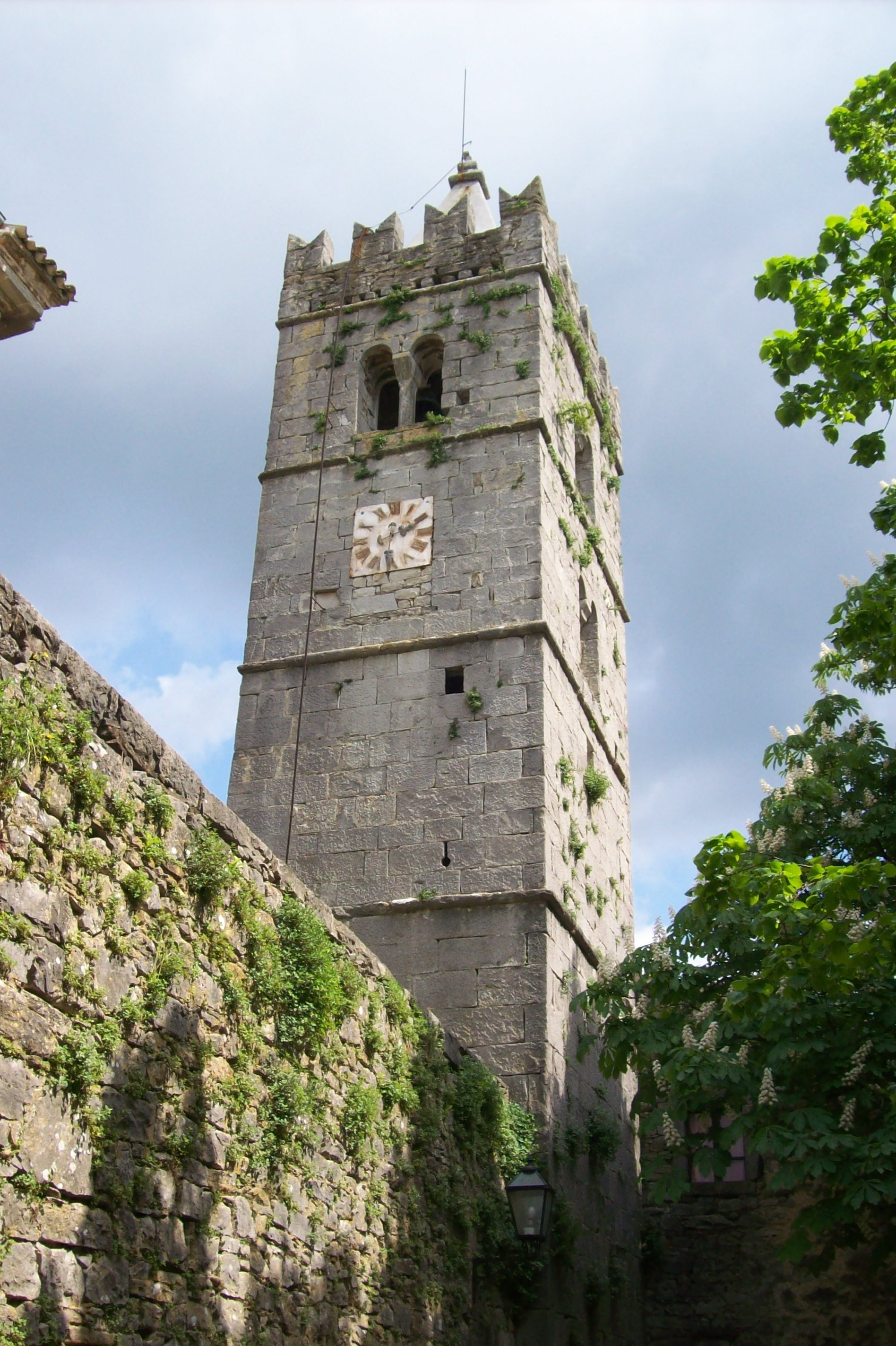 Zvonik u Humu, Hrvatska